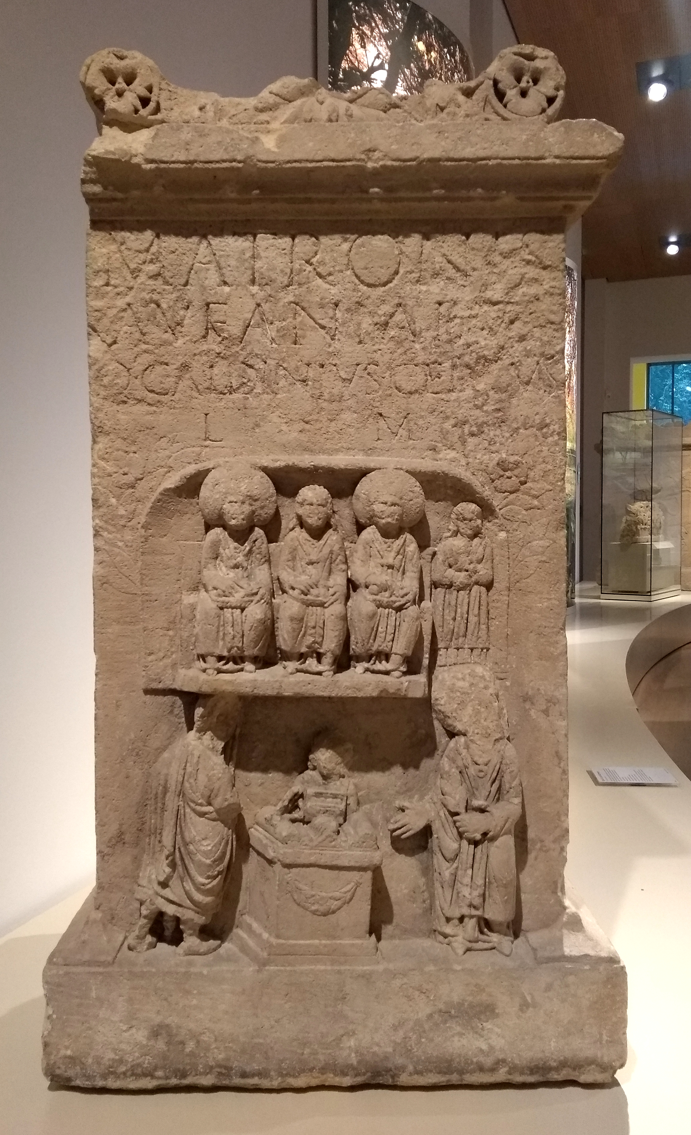 Matronenaltar im Rheinischen Landesmuseum Bonn (AE 1930,21), Vorderansicht